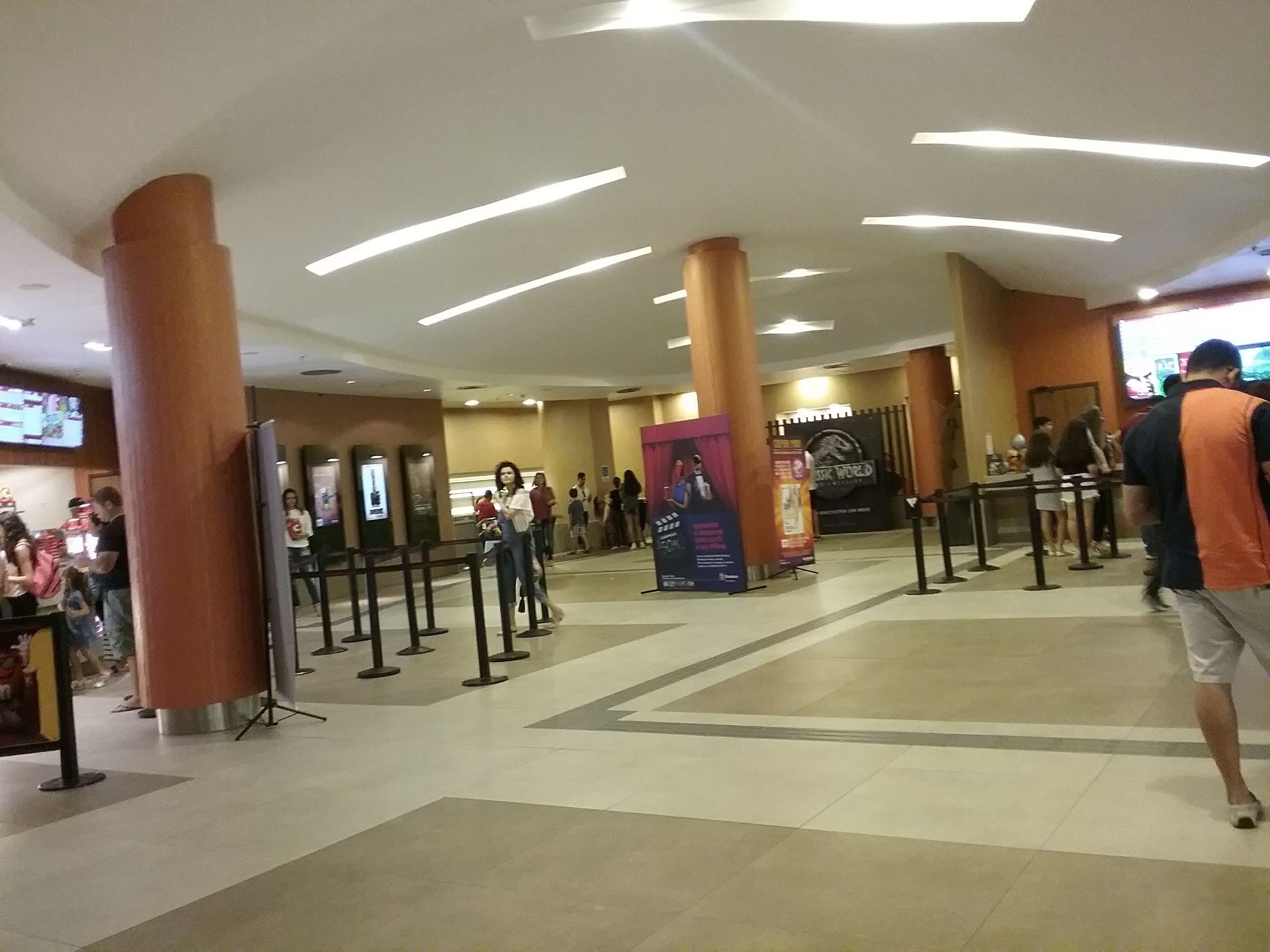 Hall do Cinemark do Riomar Aracaju.